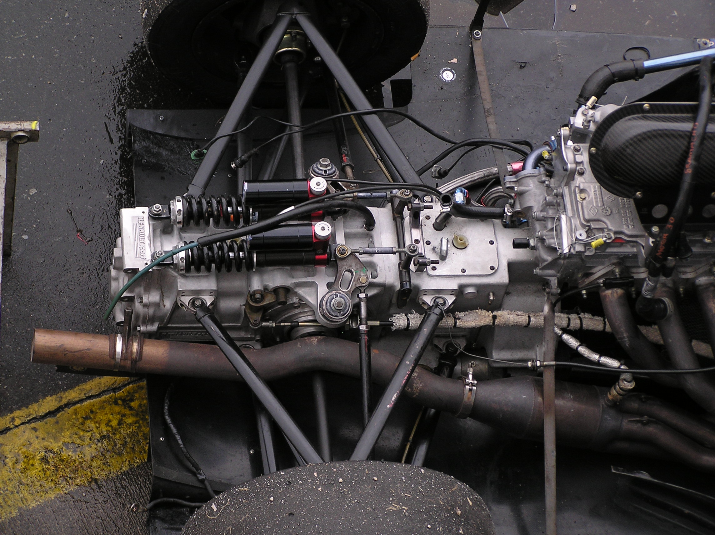 Formula Renault rear